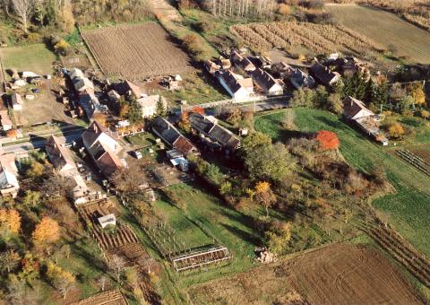 Sérsekszőlős, Hungary, aerialphotography